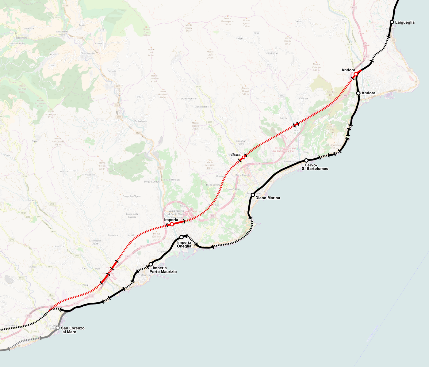 Mappa della variante di tracciato fra Andora e il posto di passaggio San Lorenzo, sulla ferrovia Genova-Ventimiglia, attivata l’11 dicembre 2016.